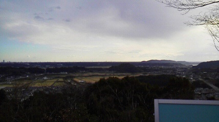 目の前には井伊谷の街と田んぼが、南東の方角には、浜名湖をみることができる。